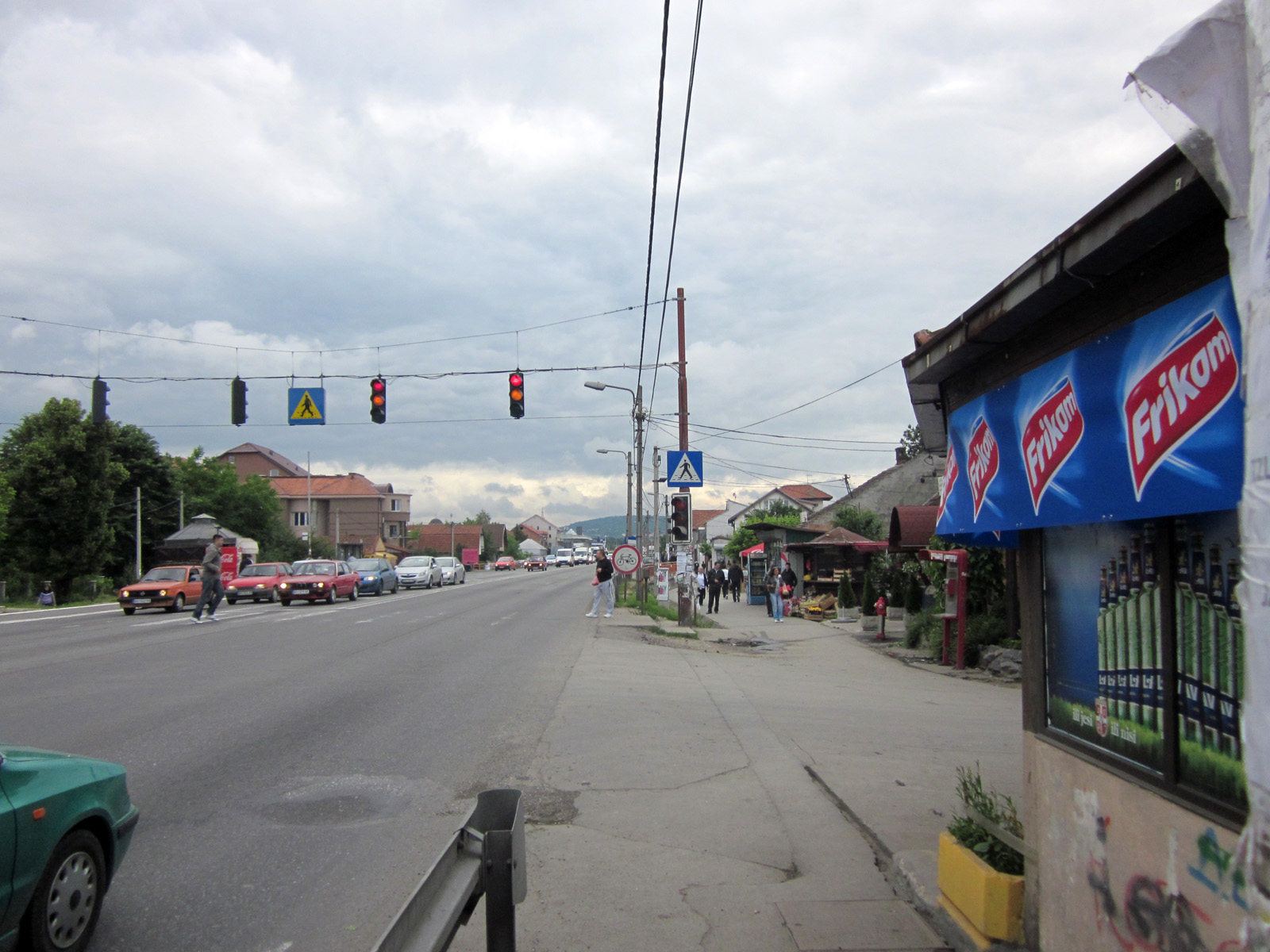 Zrenjanin - Belgrade road (Зрењанински пут), 6 km from downtown Belgrade.